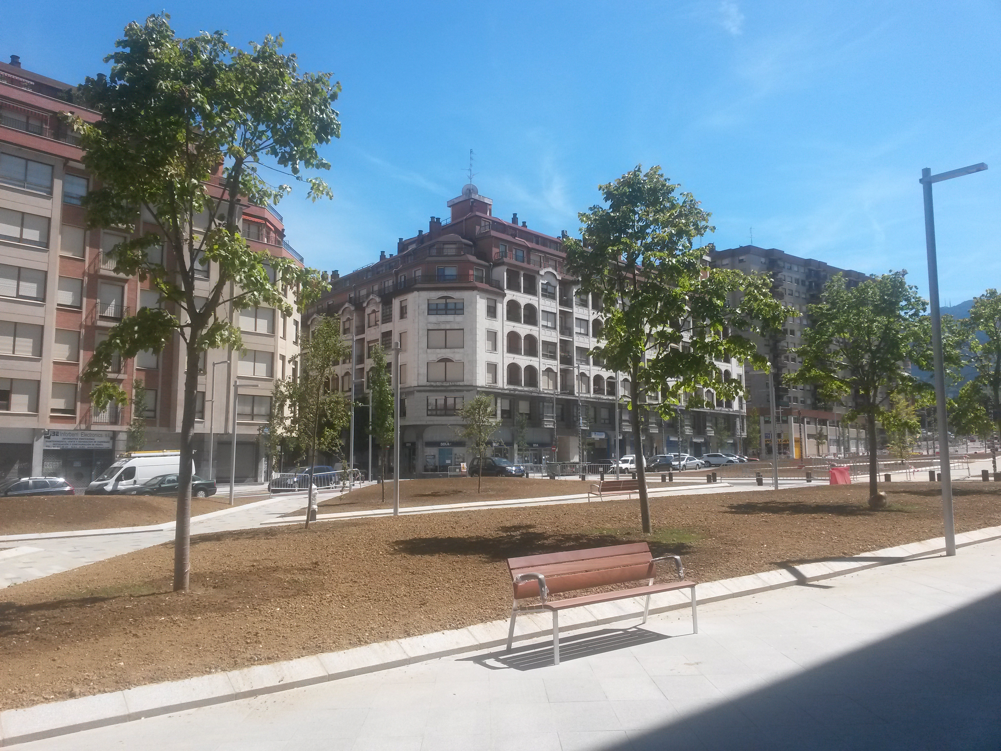 Avenida Sabino Arana.